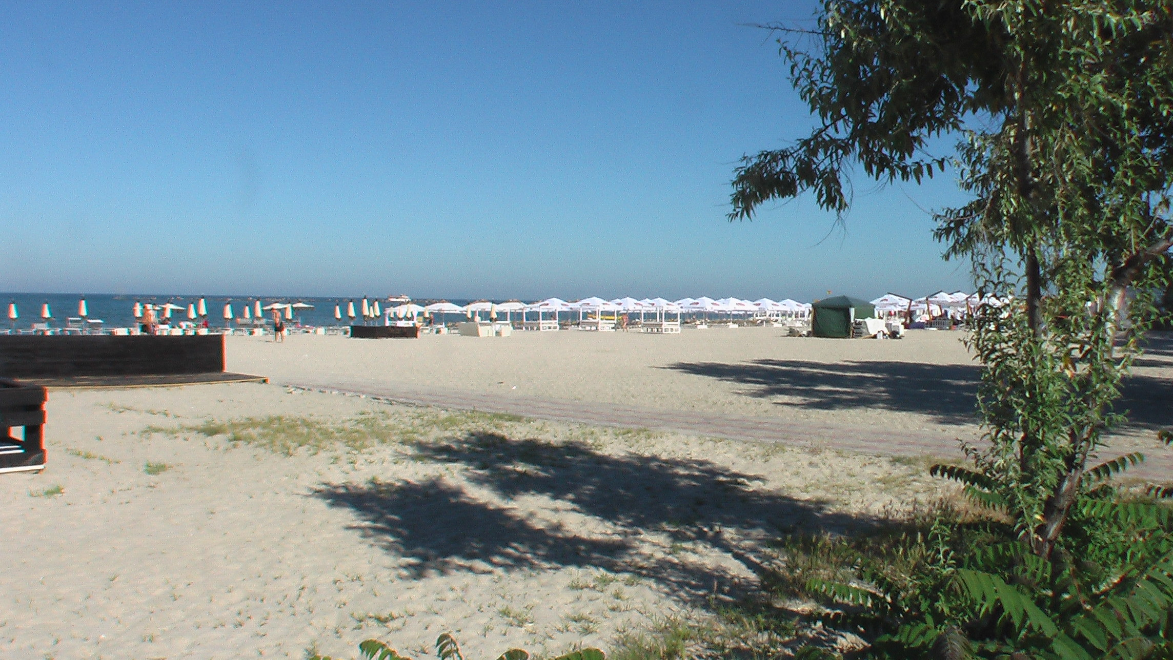 MamaiaStrand1